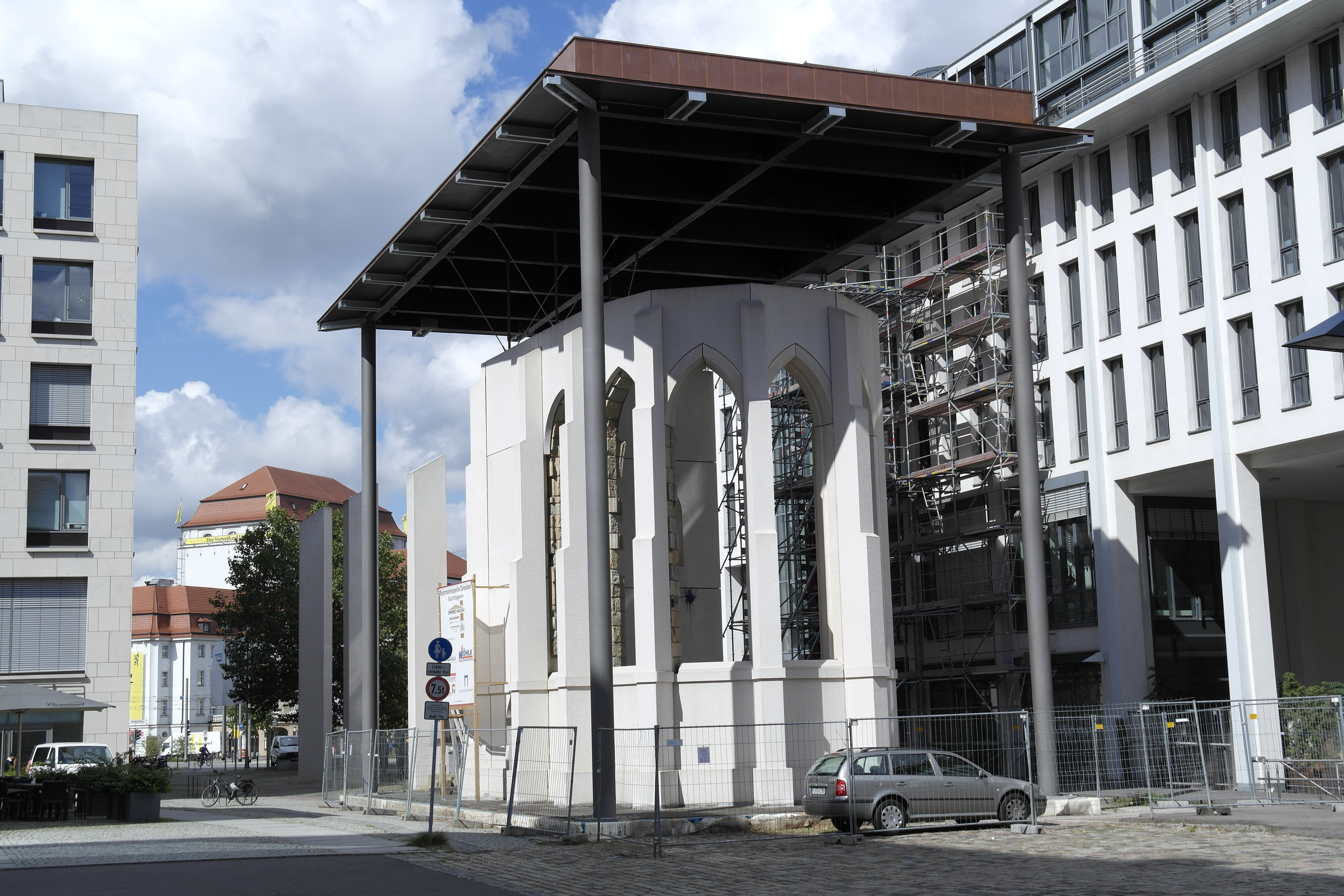 Dresden, Busmannkapelle